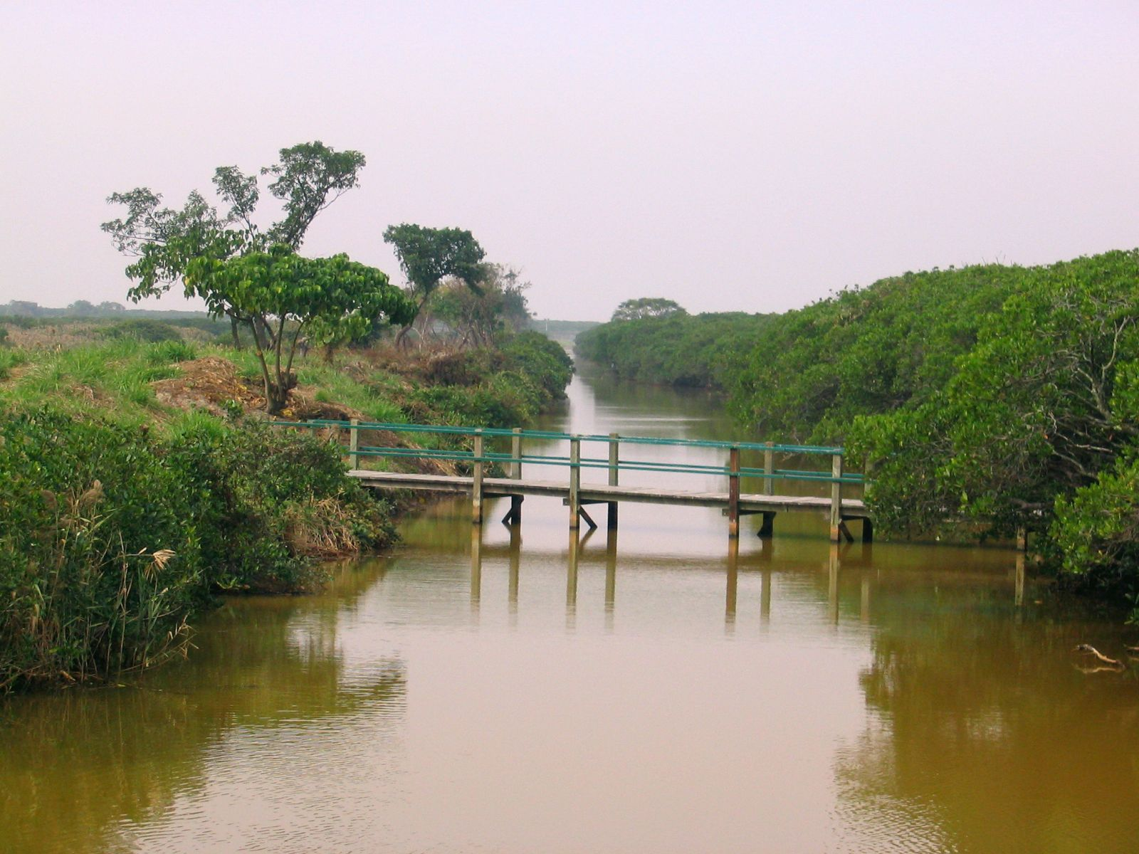 米埔自然保護區-基圍 Gei Wai, WWF Mai Po Nature Reserve